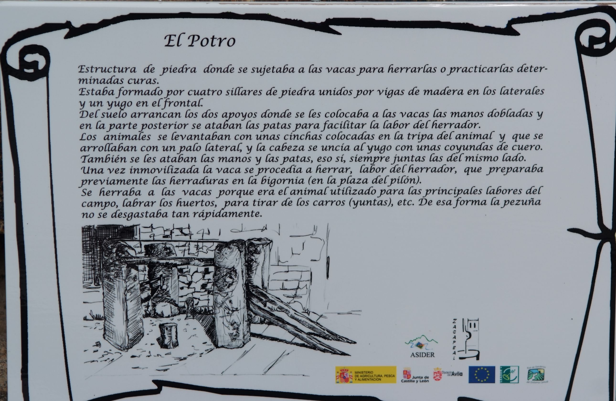 Descripción de potro de herrar (Navalperal de Tormes; Ávila; España)